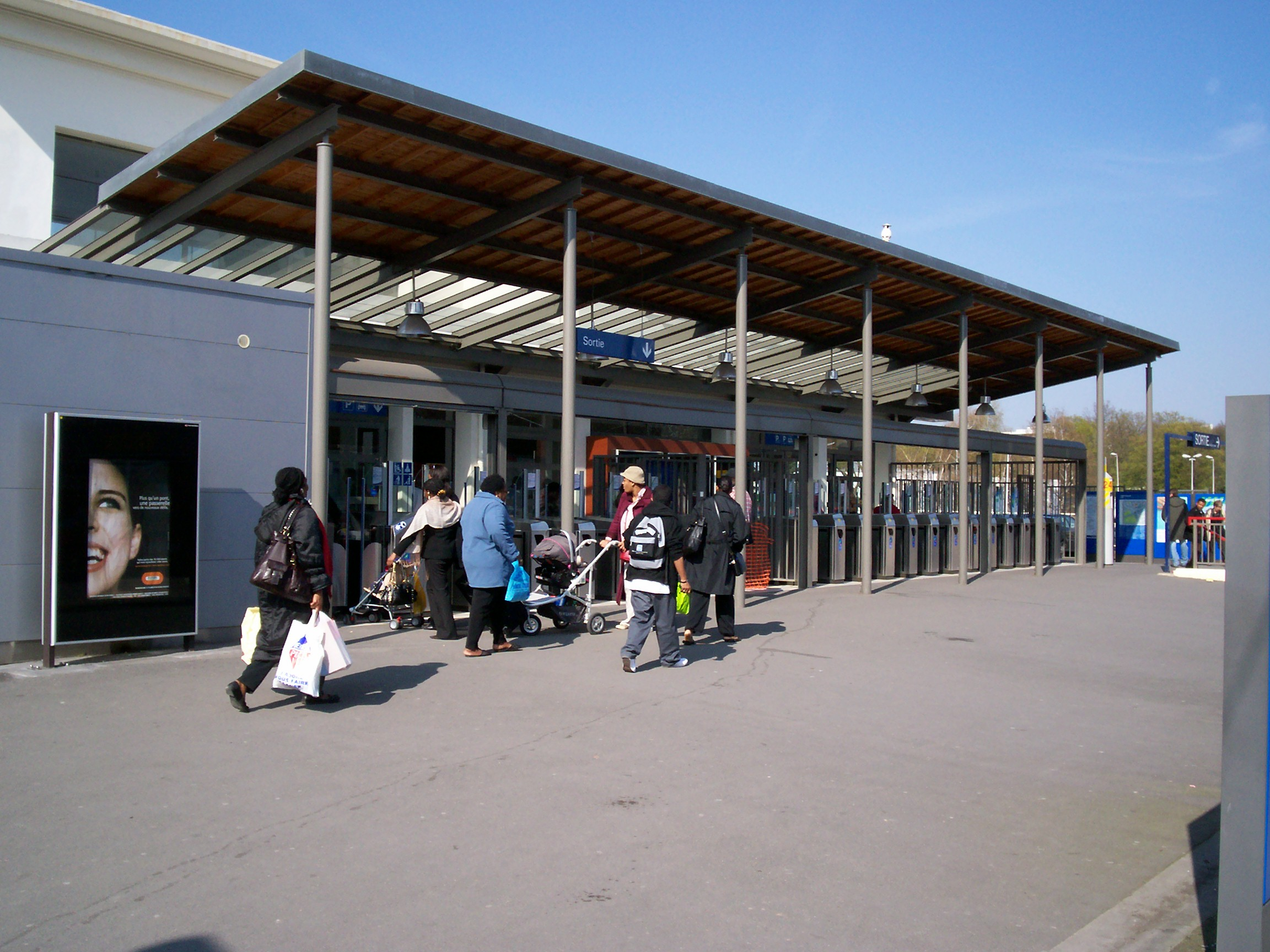 Gare du Vert-Galant